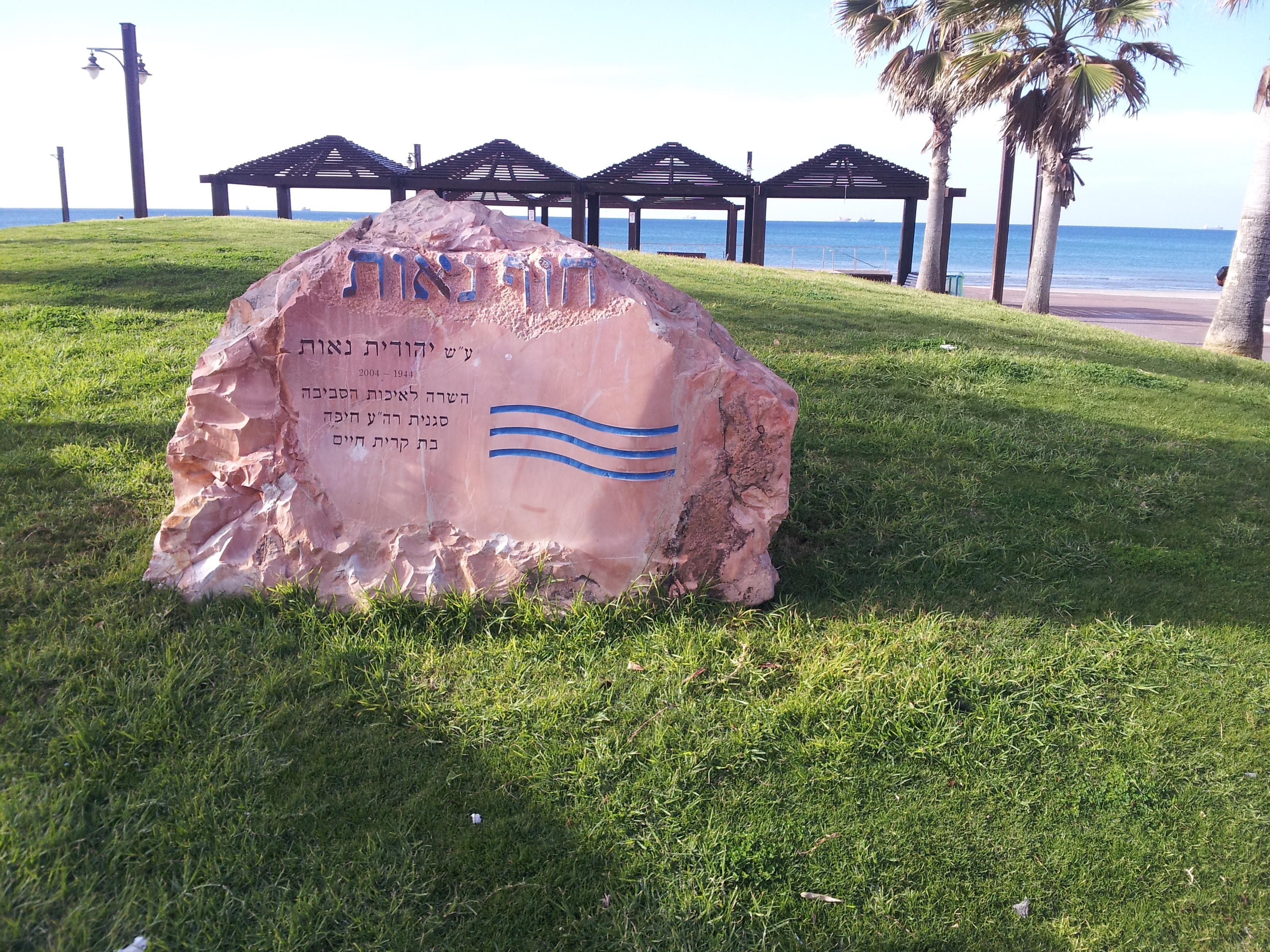 חוף נאות ע"ש יהודית נאות